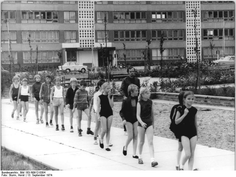 Neubrandenburg, Sportklasse ADN-ZB Sturm 13.9.1974 Zum Beitrag "Entdeckungen zwischen vier Toren - Eine Bezirksstadt mach von sich reden" In der rasch wachsenden Oststadt von Neubrandenburg befindet sich ein ganzer Komplex von Volksbildungseinrichtungen, zu dem eine erweiterte und zwei polytechnische Oberschulen gehören. Nicht zuletzt der Schulsport (auf dem Bild eine Klasse, die eben die Sportstunde beendet hat) trug dazu bei, daß immer öfter in den Bestenlisten vieler Disziplinen Namen junger Neubrandenburger auftauchen.